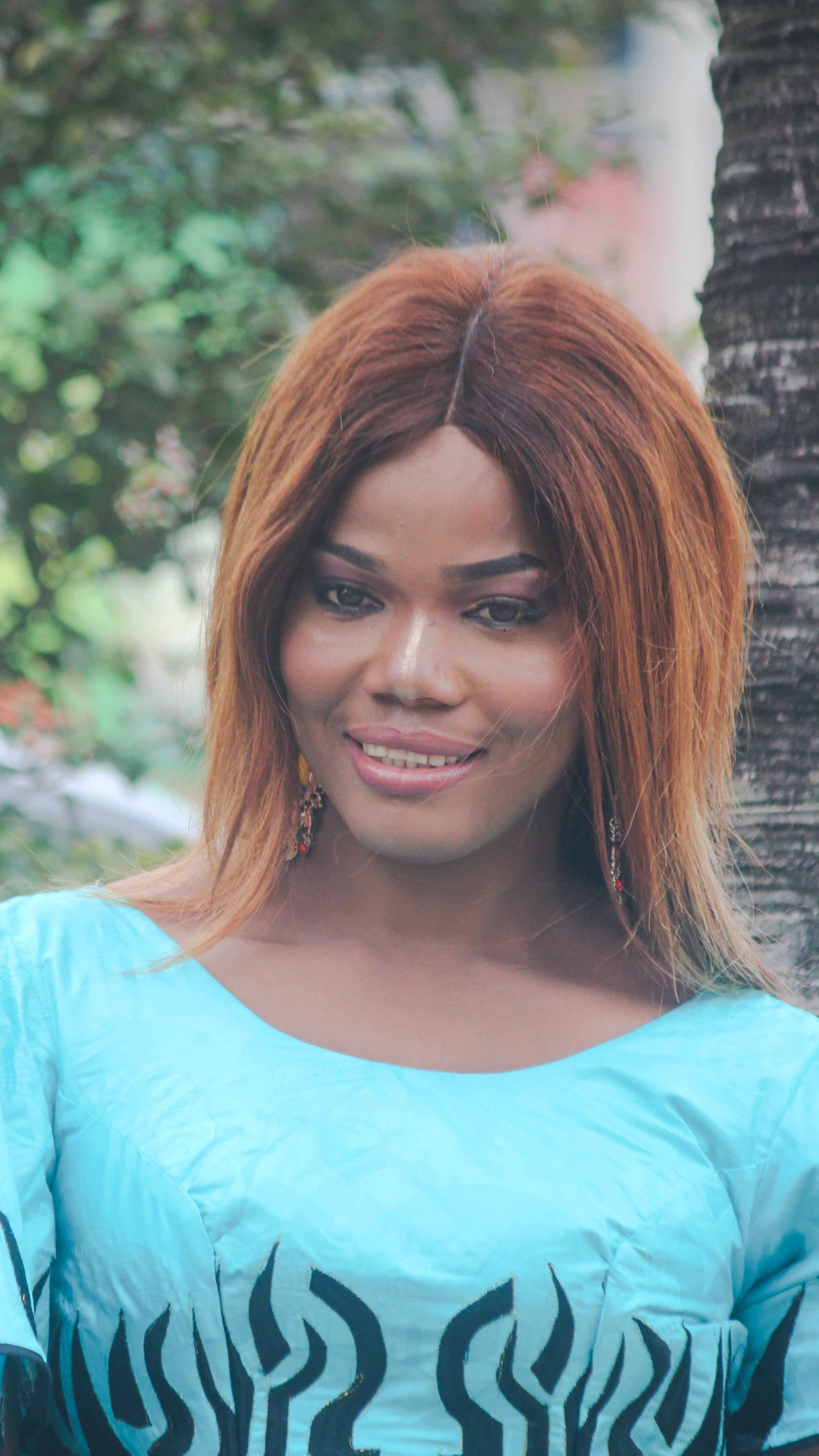 Binette Diallo en 2020